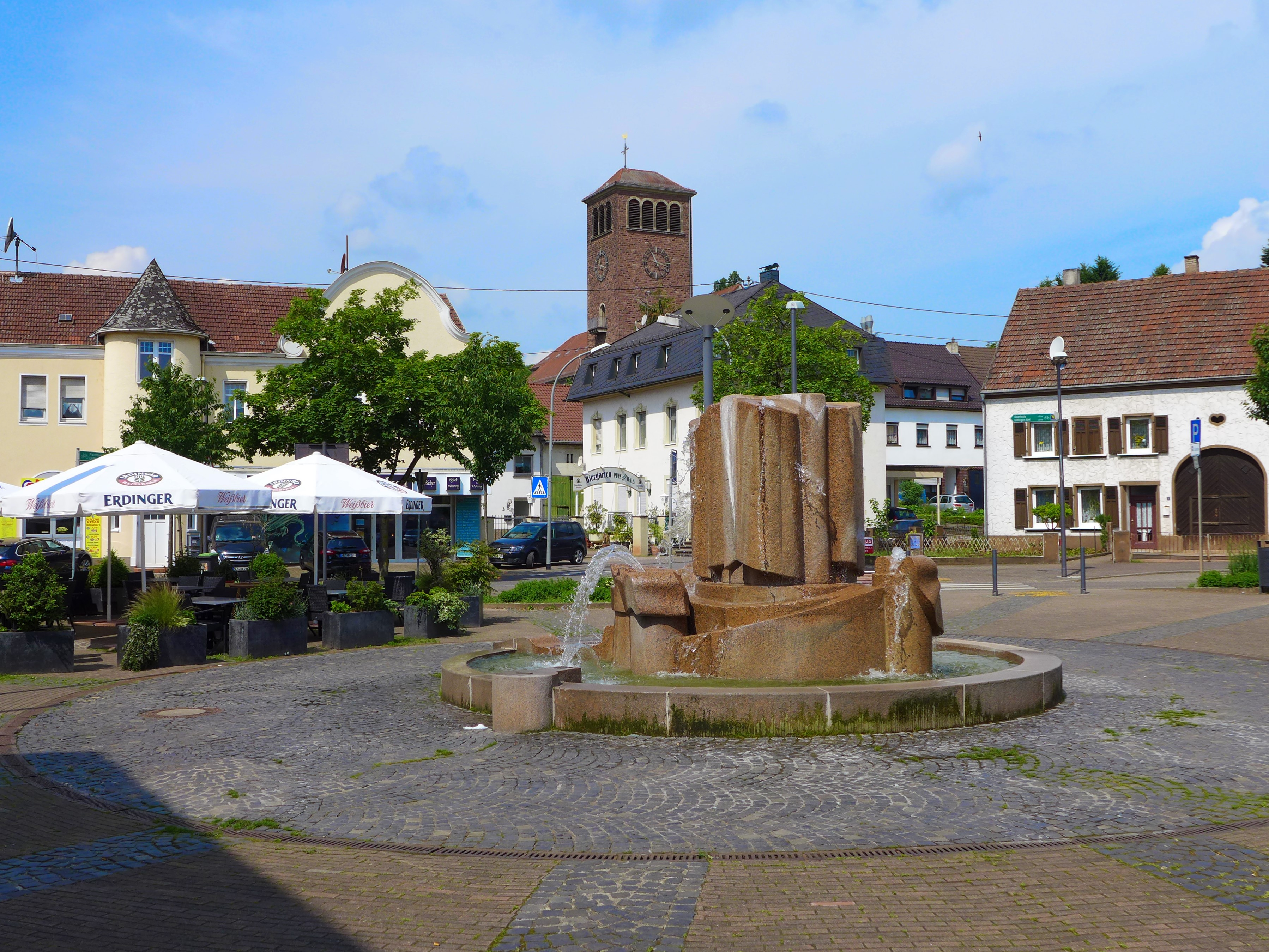 Diefflen, Dorfplatz mit Oliberius-Brunnen und Kirche St. Josef und St. Wendelin